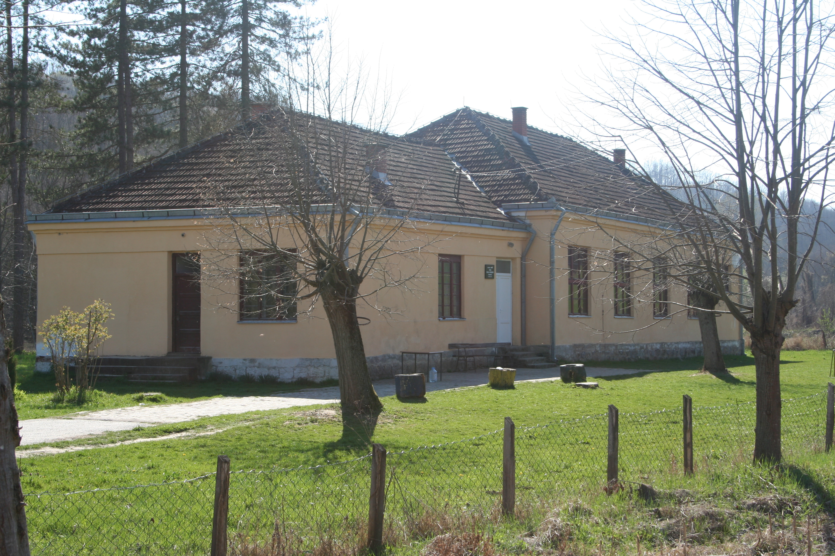 Zgrada škole, Babina Luka